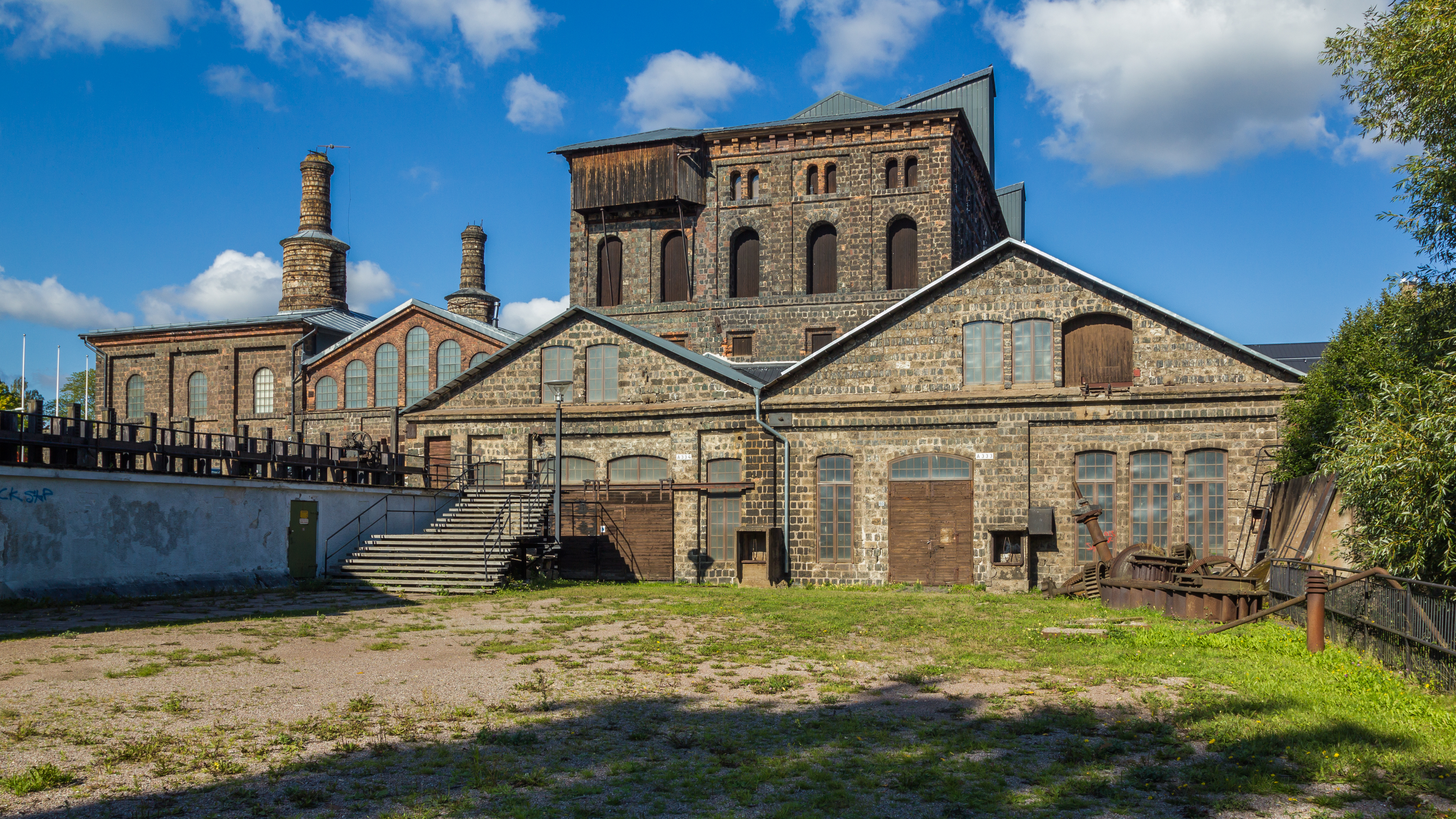 Avesta järnbrukshytta/Verket. Koppardalen, Avesta, Avesta kommun, Sverige